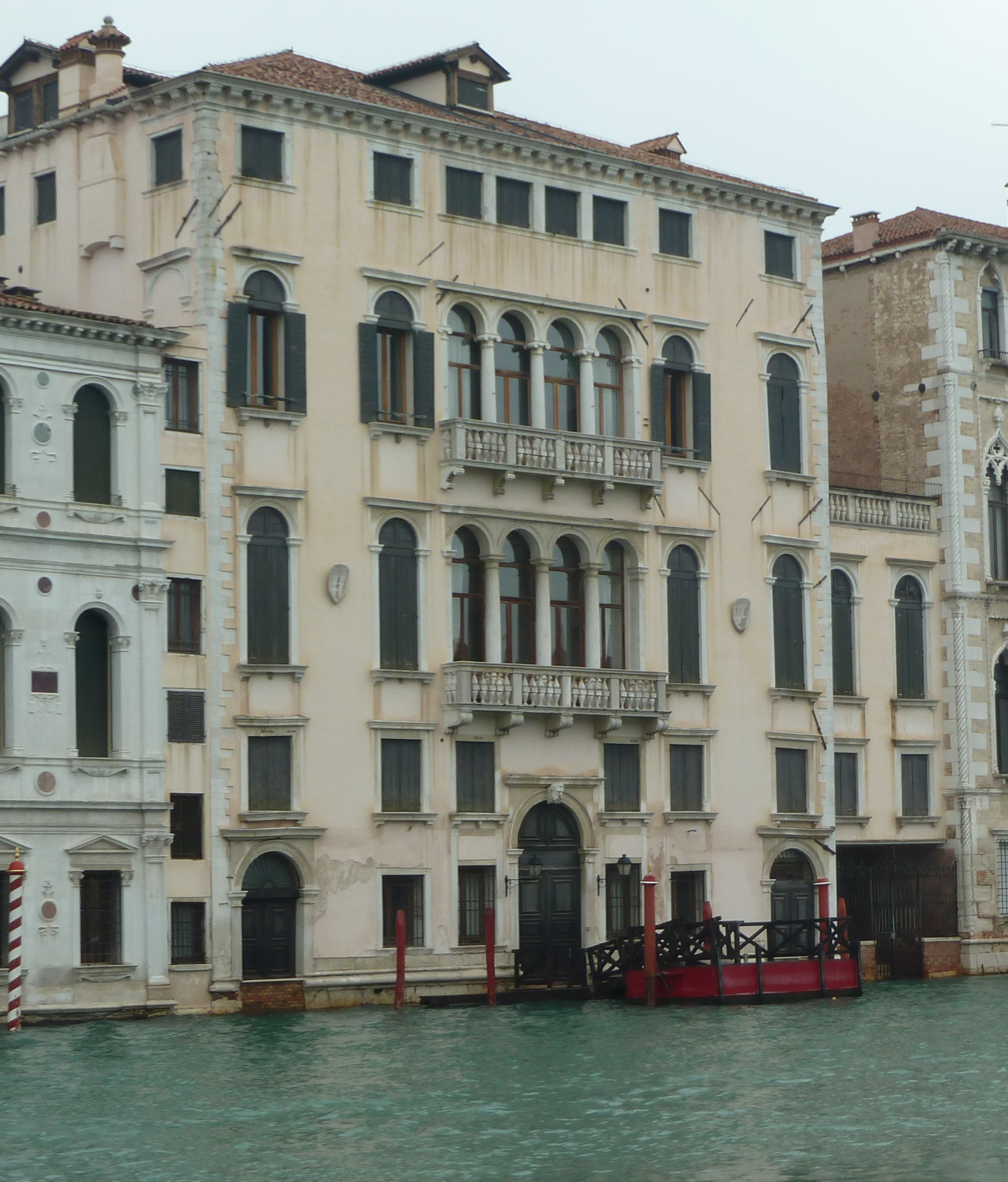 Palazzo Querini Dubois (Venice)